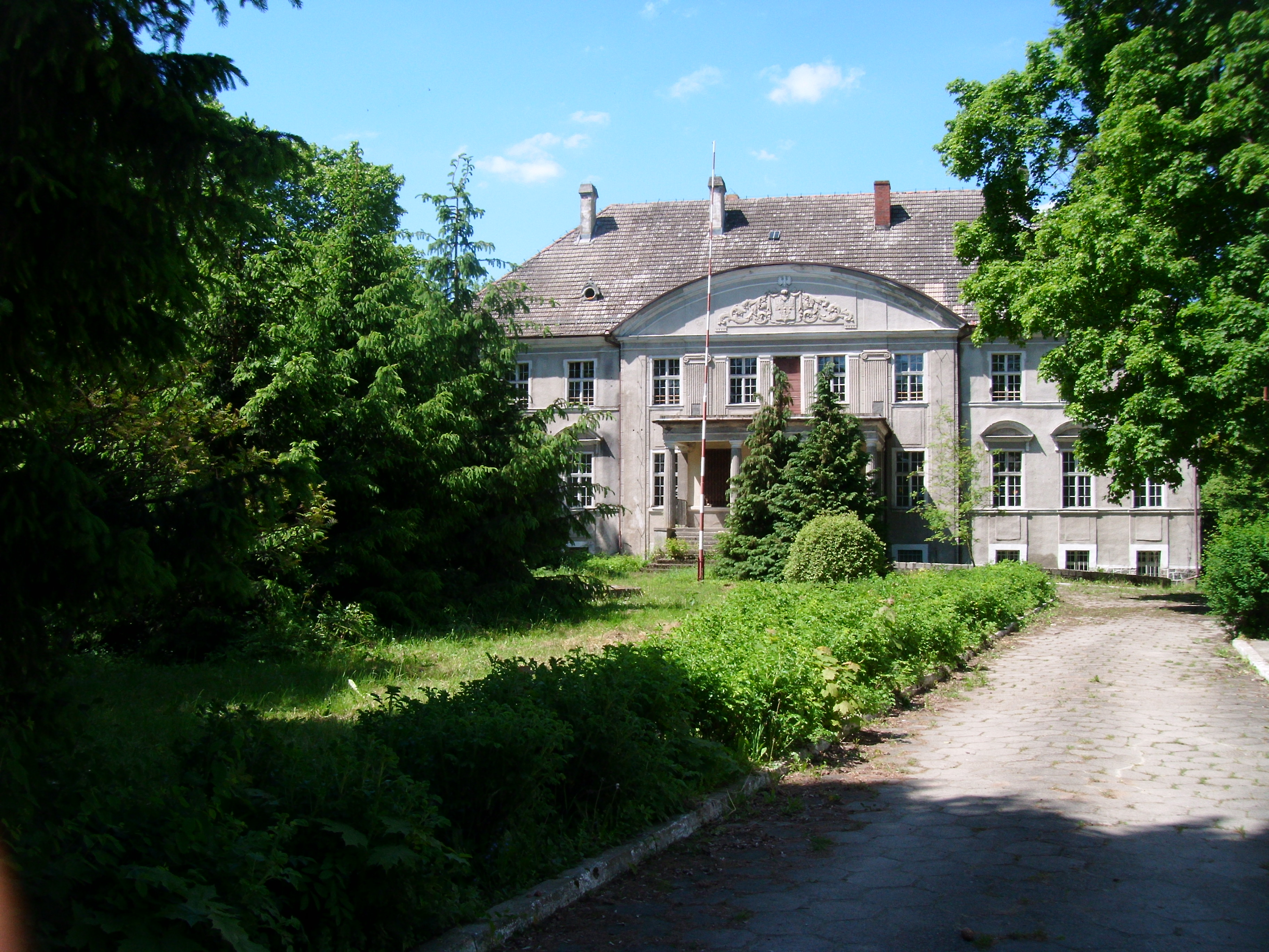 zabytkowy pałac w Święciechowie (zabytek nr rejestr. 176)